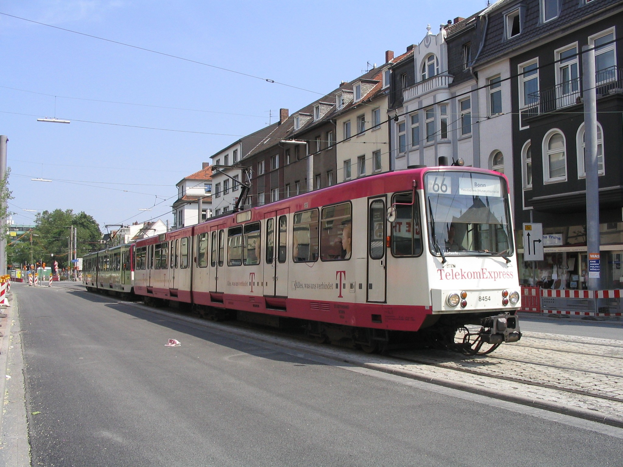 Stadtbahnwagen B am Konrad-Adenauer-Platz in Bonn-Beuel